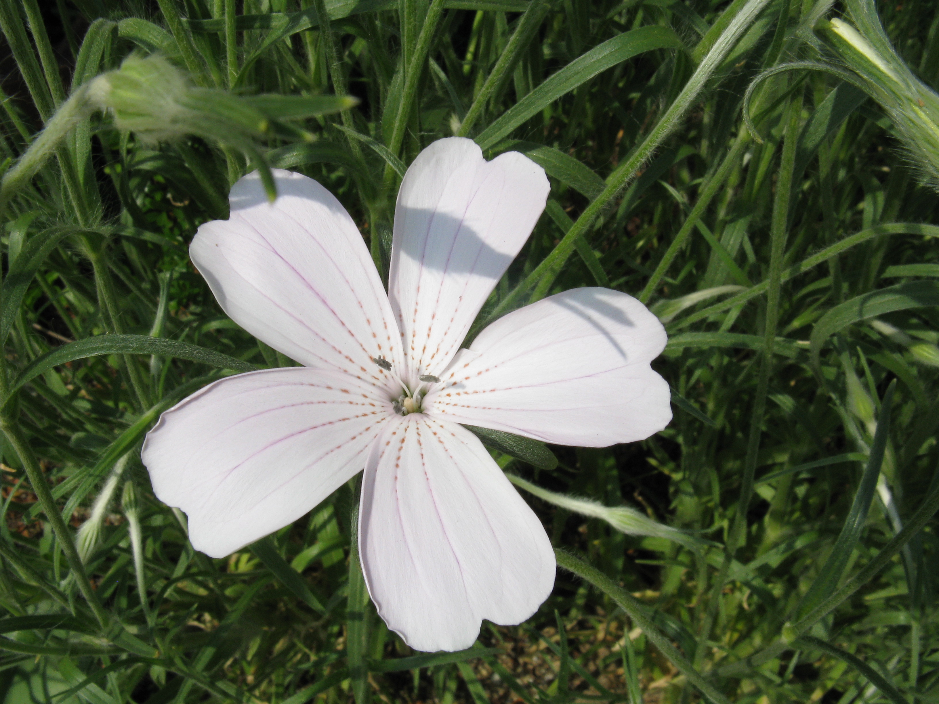 Agrostemma githago 'Sakuragai'